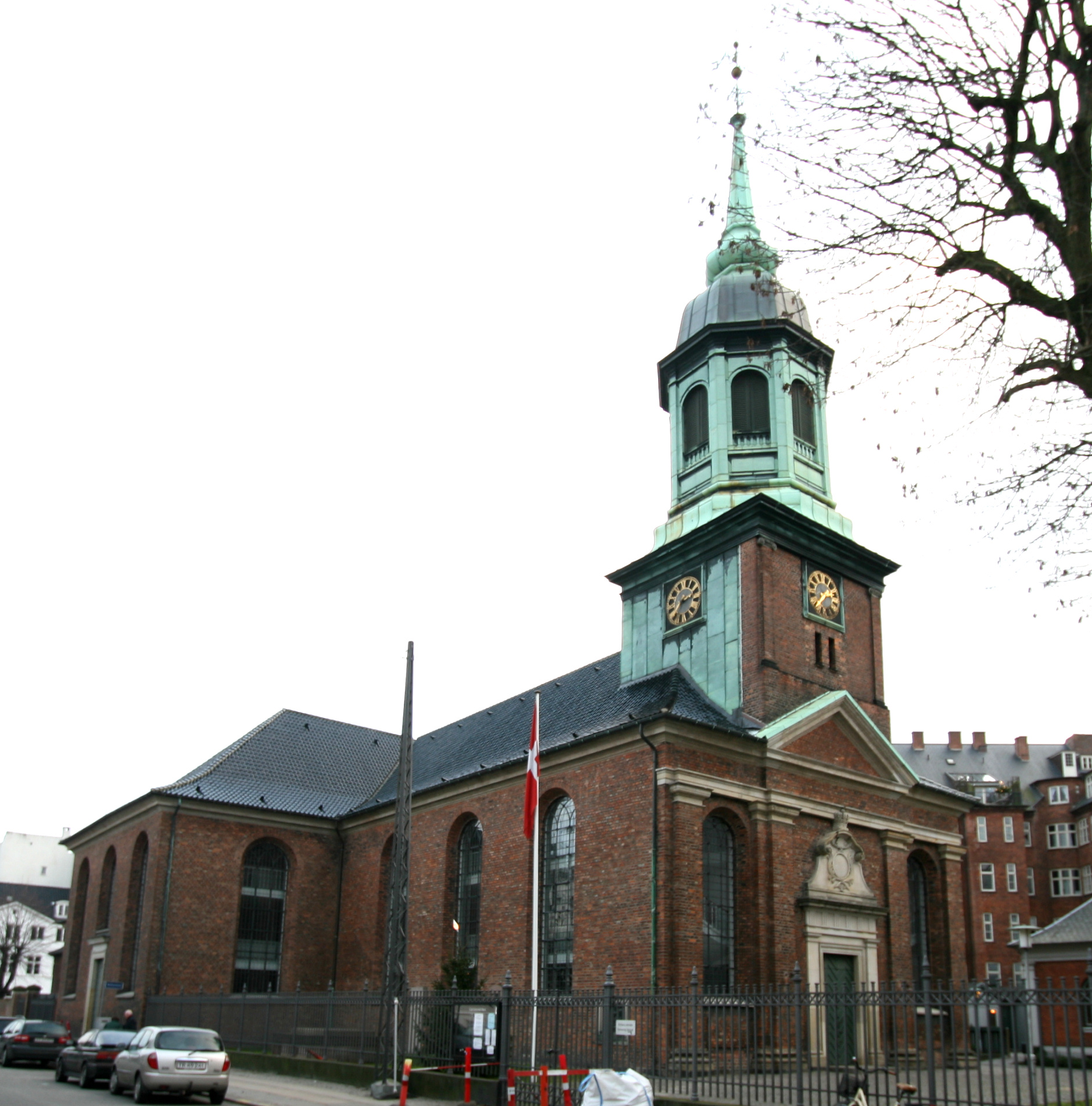 Garnisons Kirke (Garrison Church), Copenhagen, Denmark.